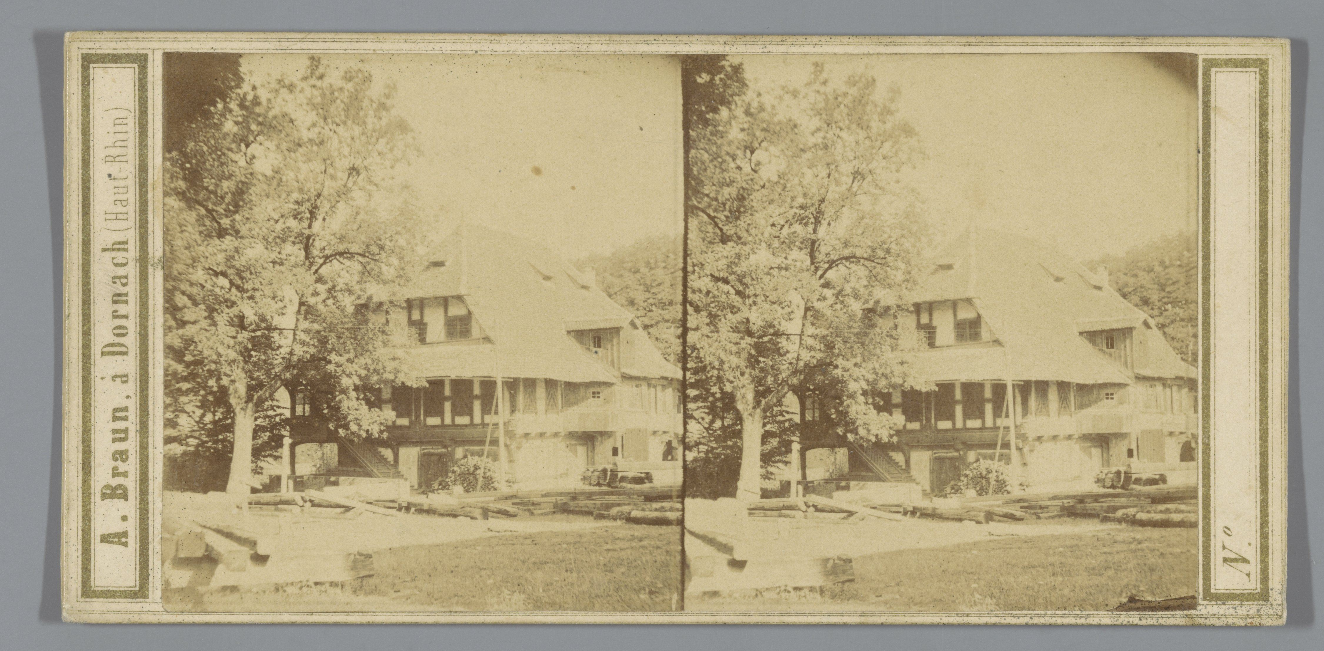 IdentificatieTitel(s): Huis in Bern, ZwitserlandAncienne maison du Tir à Berne (titel op object)Objecttype: stereofoto Objectnummer: RP-F-F07830Opschriften / Merken: nummer, verso, gedrukt: ‘483.’Omschrijving: Mogelijk een jachthuis.VervaardigingVervaardiger: fotograaf: anoniemuitgever: Adolphe Braun et Cie (vermeld op object)Plaats vervaardiging: fotograaf: Bernuitgever: DornachDatering: 1860 - 1866Materiaal: karton fotopapier Techniek: albuminedrukAfmetingen: secundaire drager: h 85 mm × b 175 mmOnderwerpWat: rural housing, e.g. country-house, villa, cottageWaar: BernVerwerving en rechtenVerwerving: overdracht van beheer 1994Copyright: Publiek domein